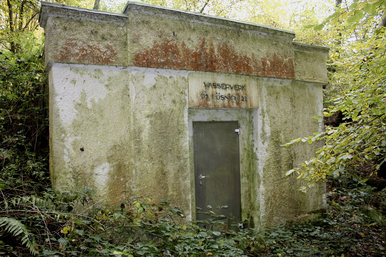 Altes Lösnicher Wasserwerk Station I von 1927 im Lösnicher Hinterwald.